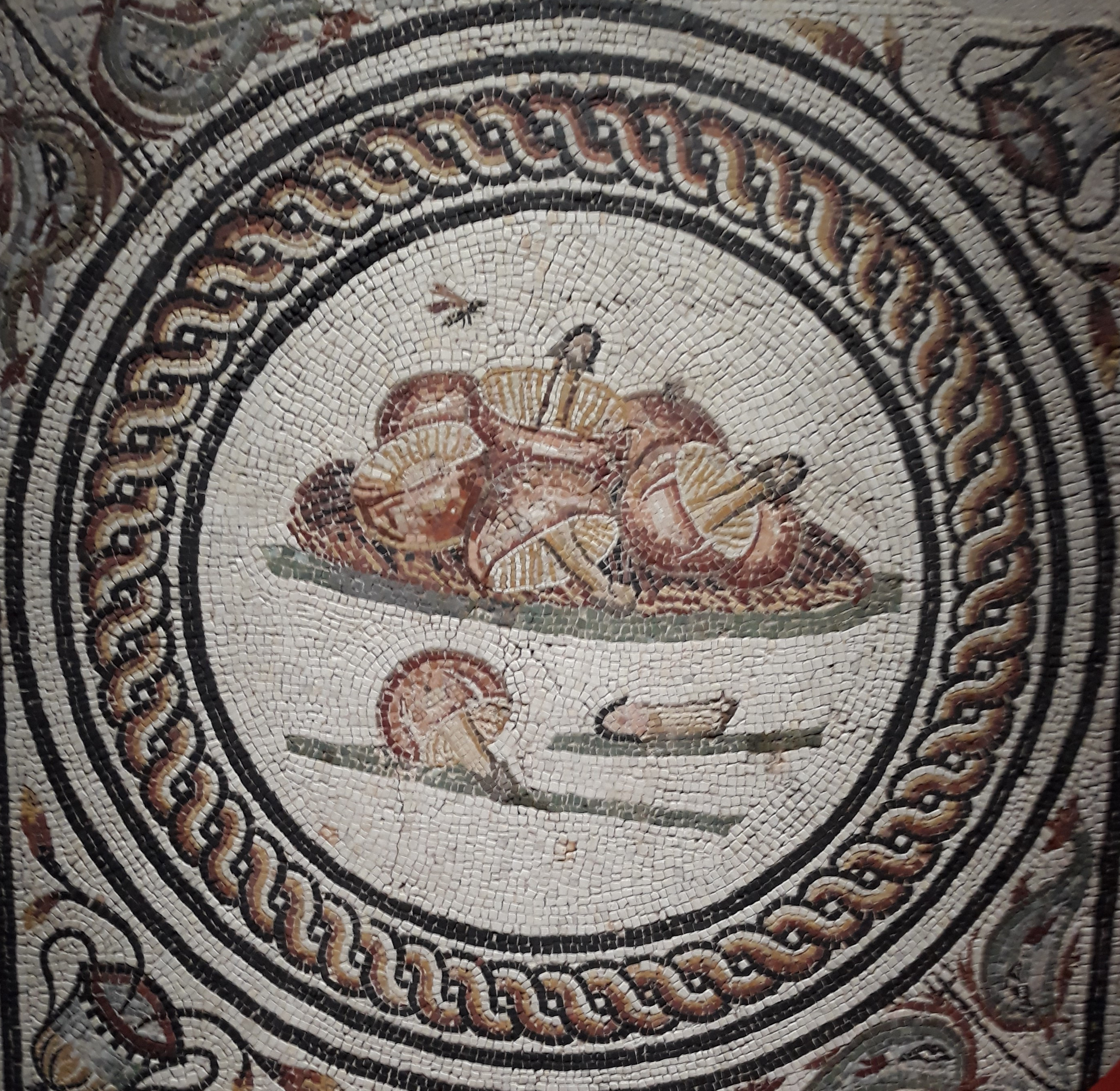 Disque orné de champignons, détail d'un des 15 tableaux de la mosaïque des Xenia retrouvé dans la maison au 5 mosaïques à Saint-Romain-en Gal lors des fouilles de 1967. Nature morte d'environ 7 champignons délimités par un cercle au décor torsadé. Les 4 coins du tableaux sont décorés de dauphins et de tiges fleuris qui sortent d'un vase antique.